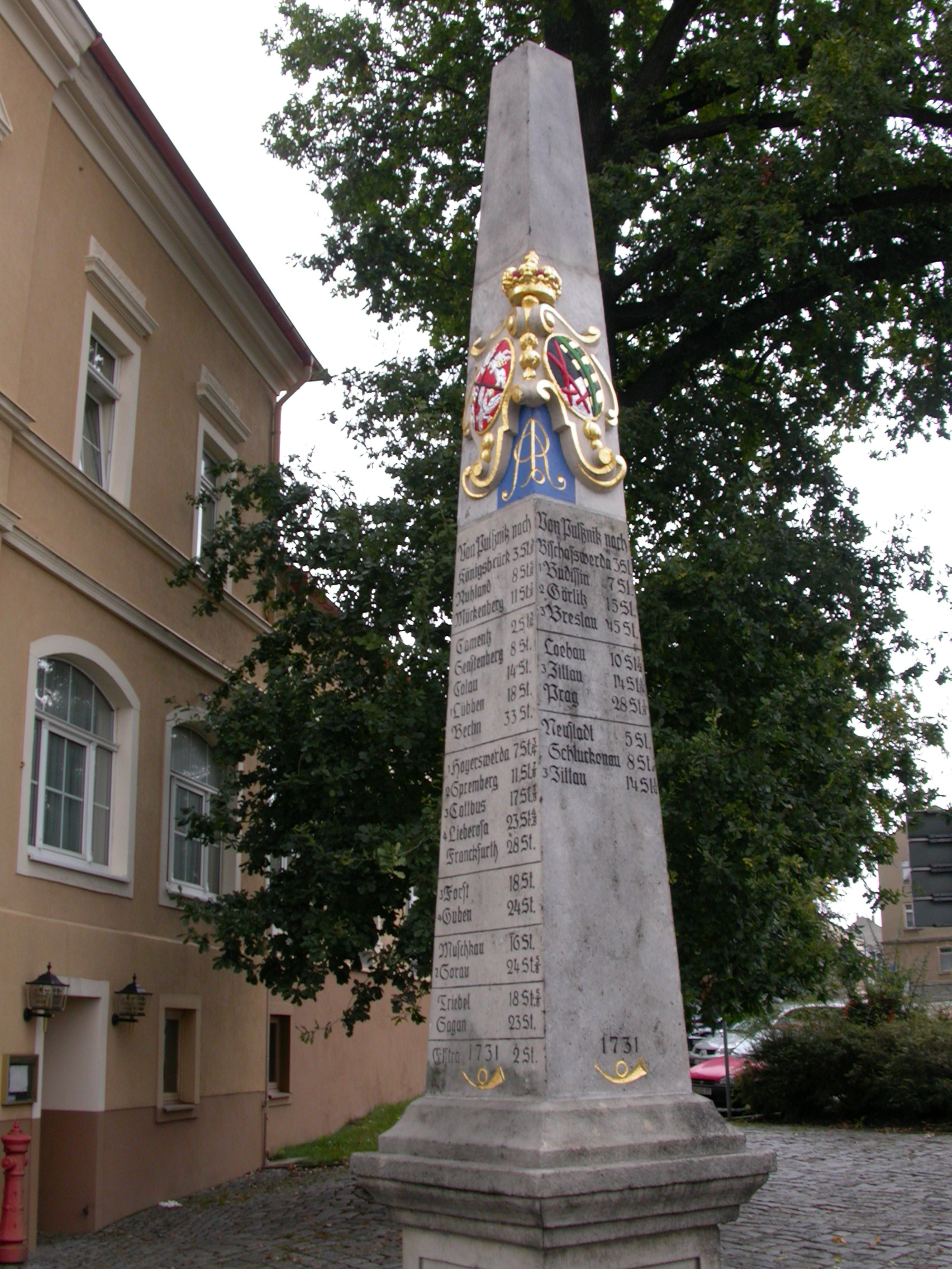 Kursächsische Postmeilensäule in Pulsnitz